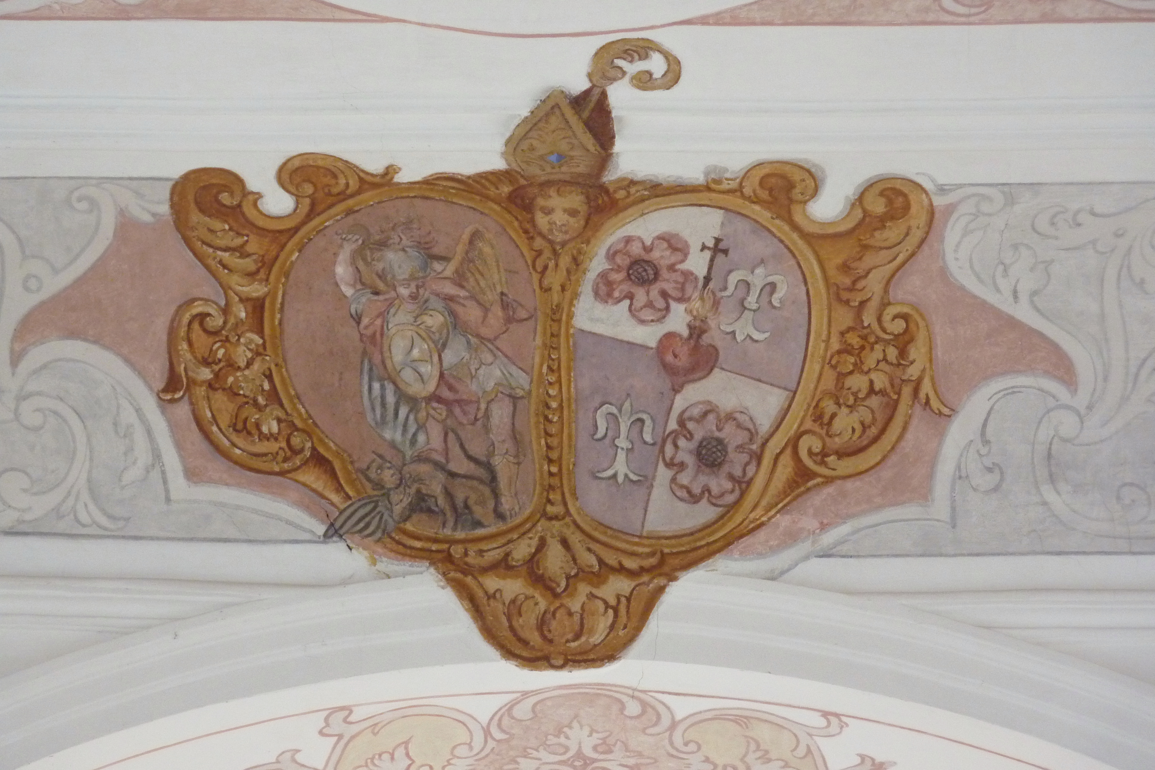 Katholische Pfarrkirche St. Leonhard in Baiershofen, einem Ortsteil der Gemeinde Altenmünster im Landkreis Augsburg (Bayern), Fresko mit Wappen des Abtes Michael Schiele, Abt des Klosters Fultenbach, Darstellung des Erzengels Michael